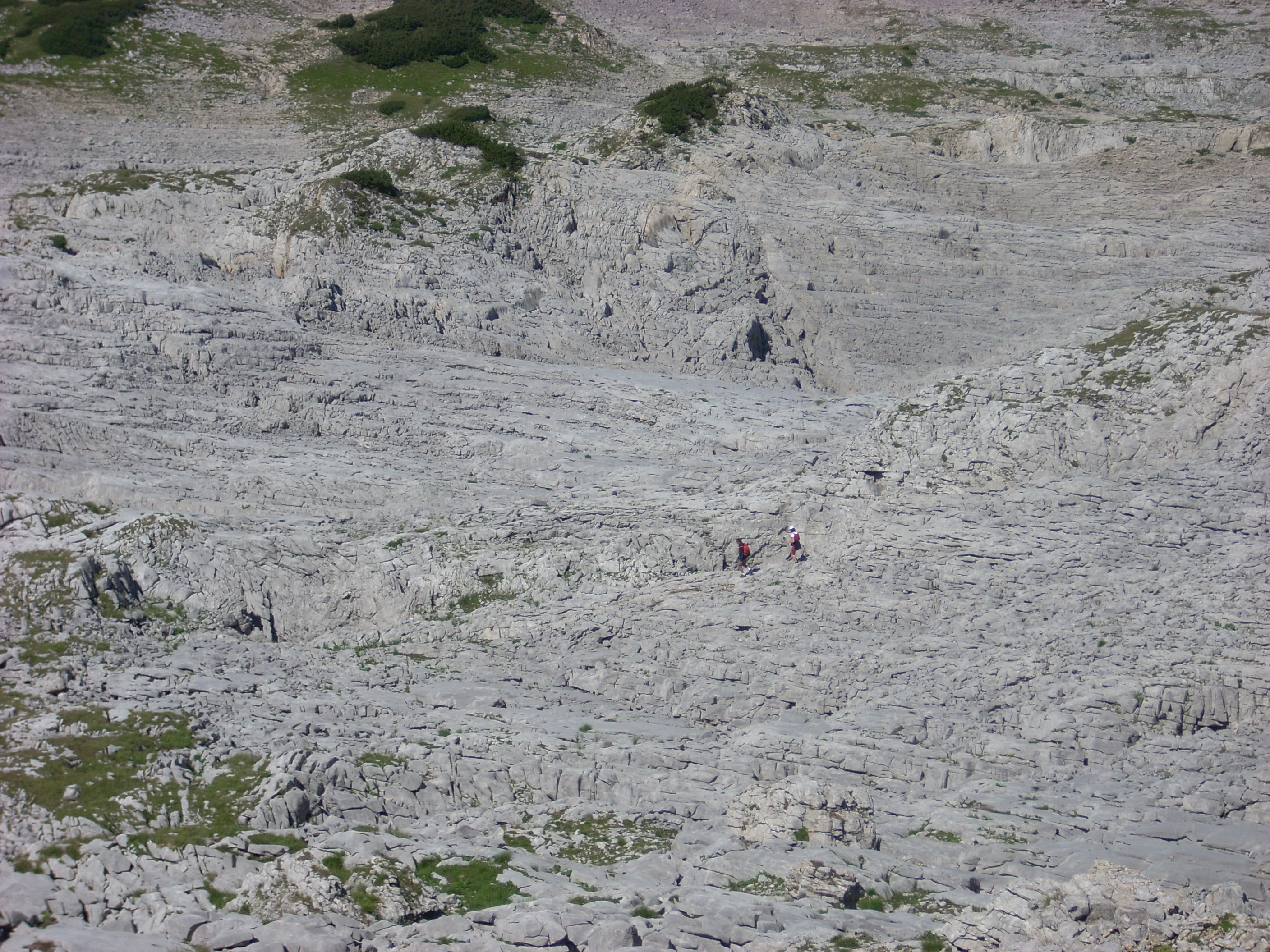 Zwei Wanderer (Größenvergleich) durchqueren den Gottesacker